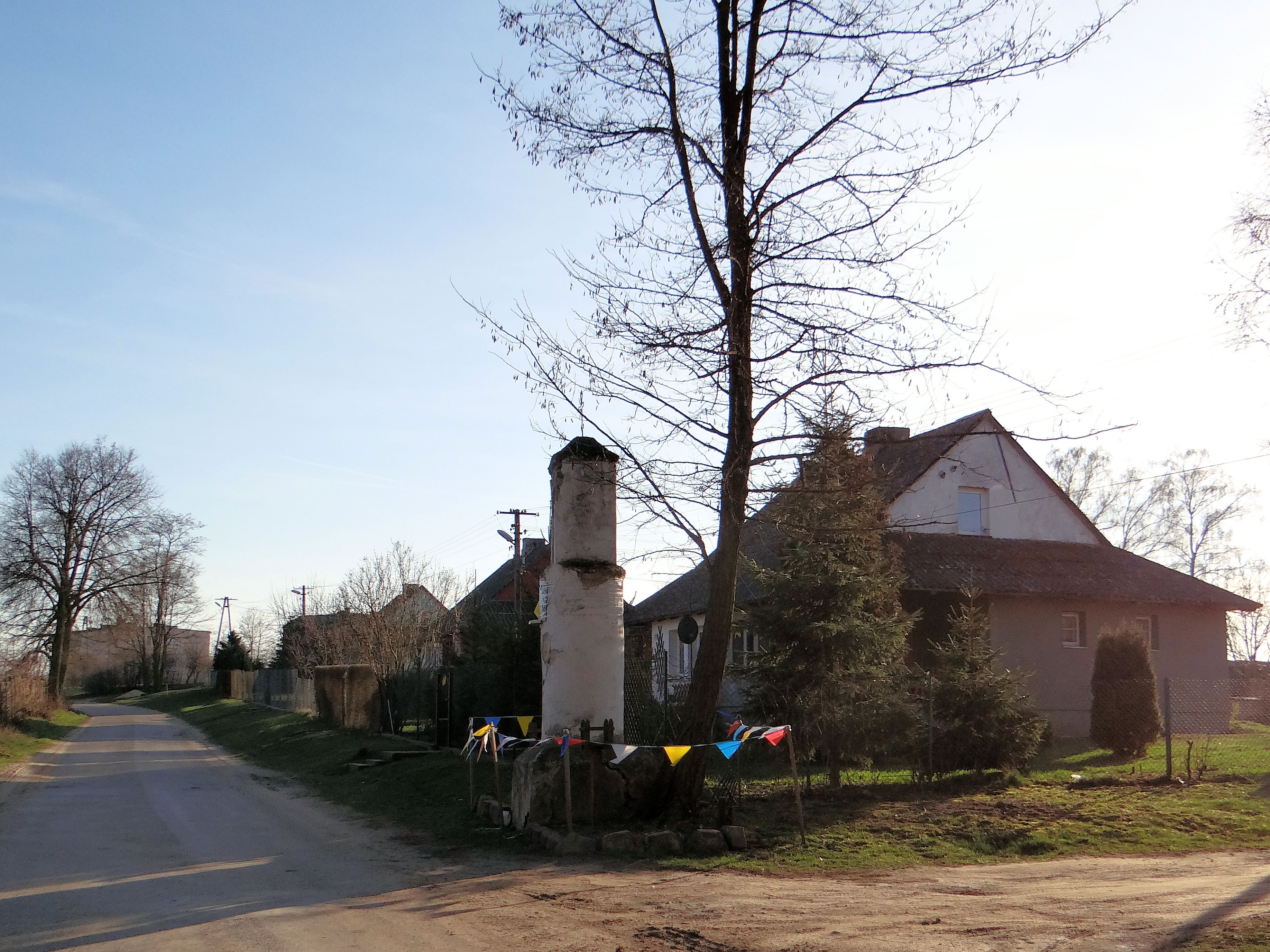 Ślubowo - wiejska droga z zabudowaniami i okrągłą przydrożną kapliczką